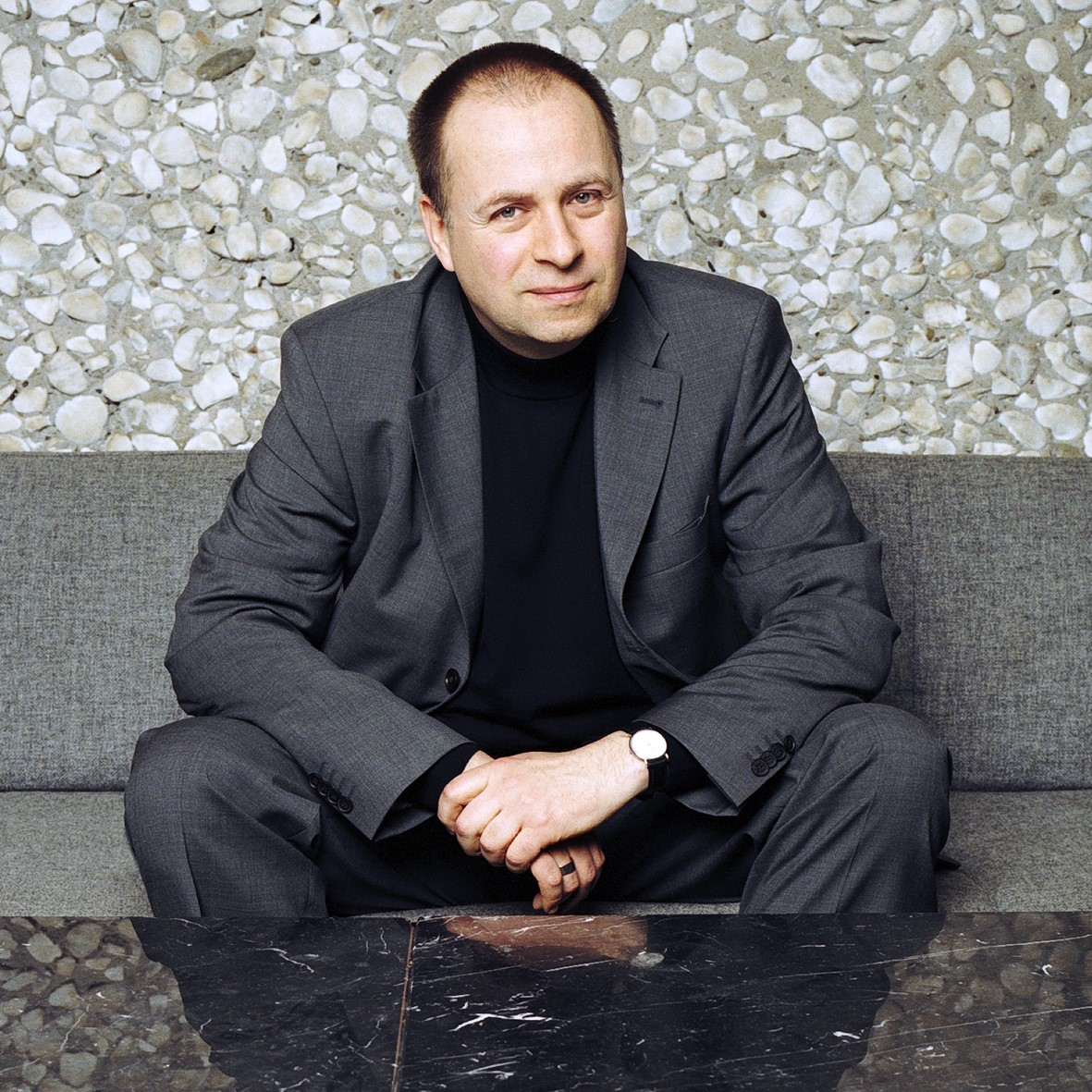 Foto von Manfred Hans Ernst Heinze, deutscher Maler, Objektkünstler und Autor. Foto: Florian von Ploetz, Berlin